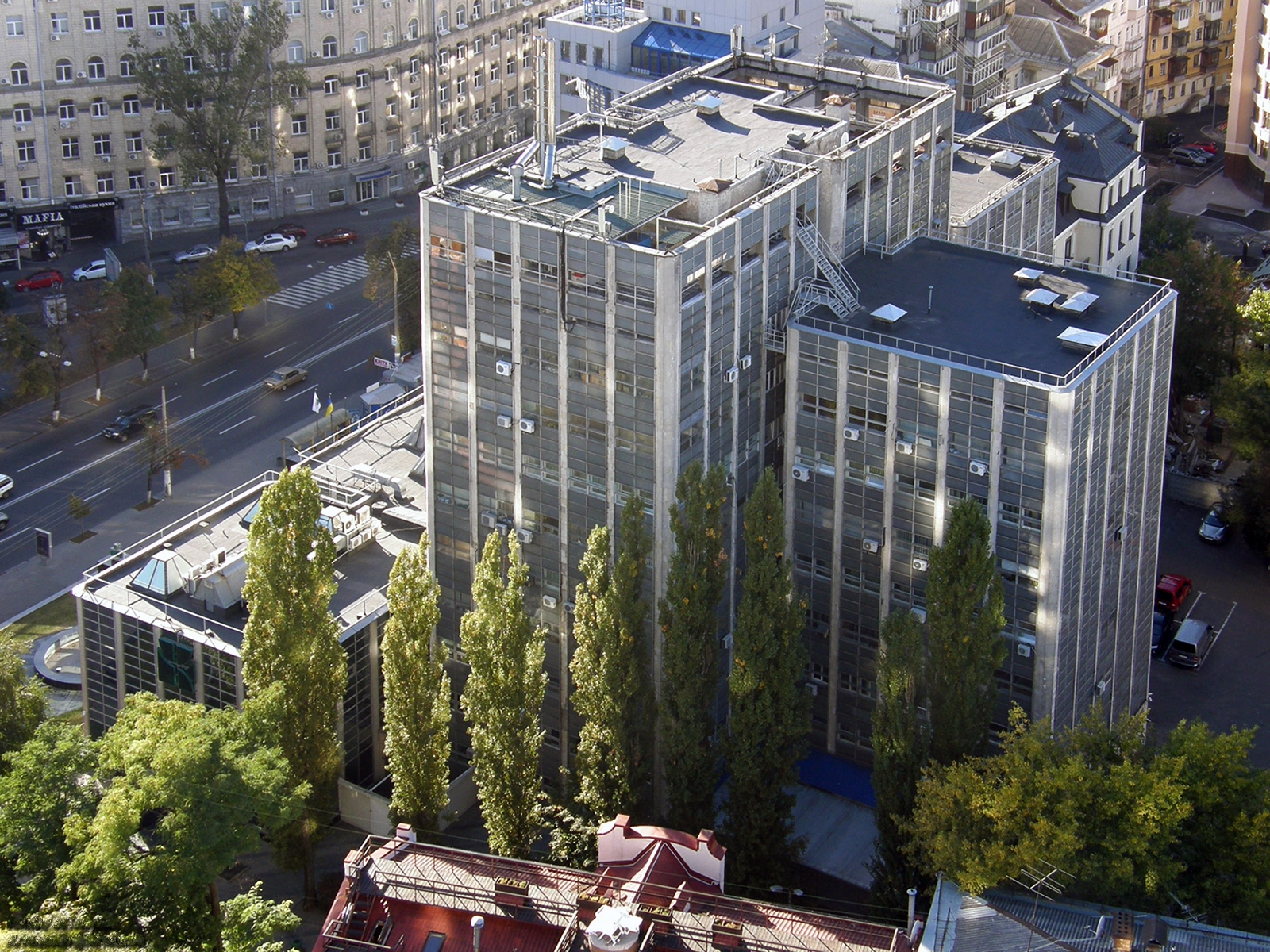 Институт транспорта нефти (улица Сечевых Стрельцов, 60)